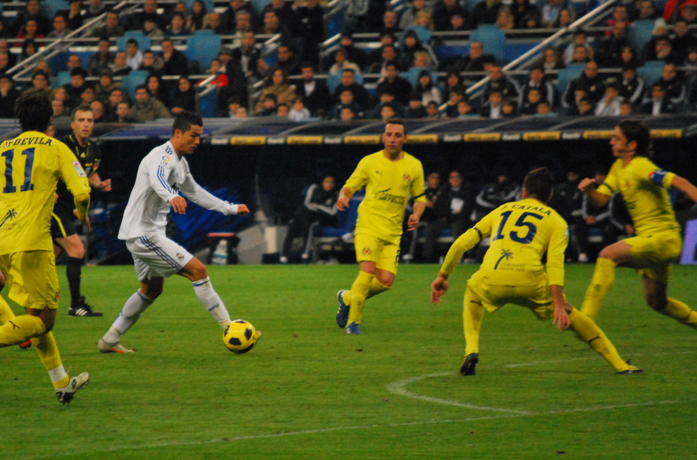 Real Madrid 4 - Villarreal 2 La Liga: 9 de Enero 2011